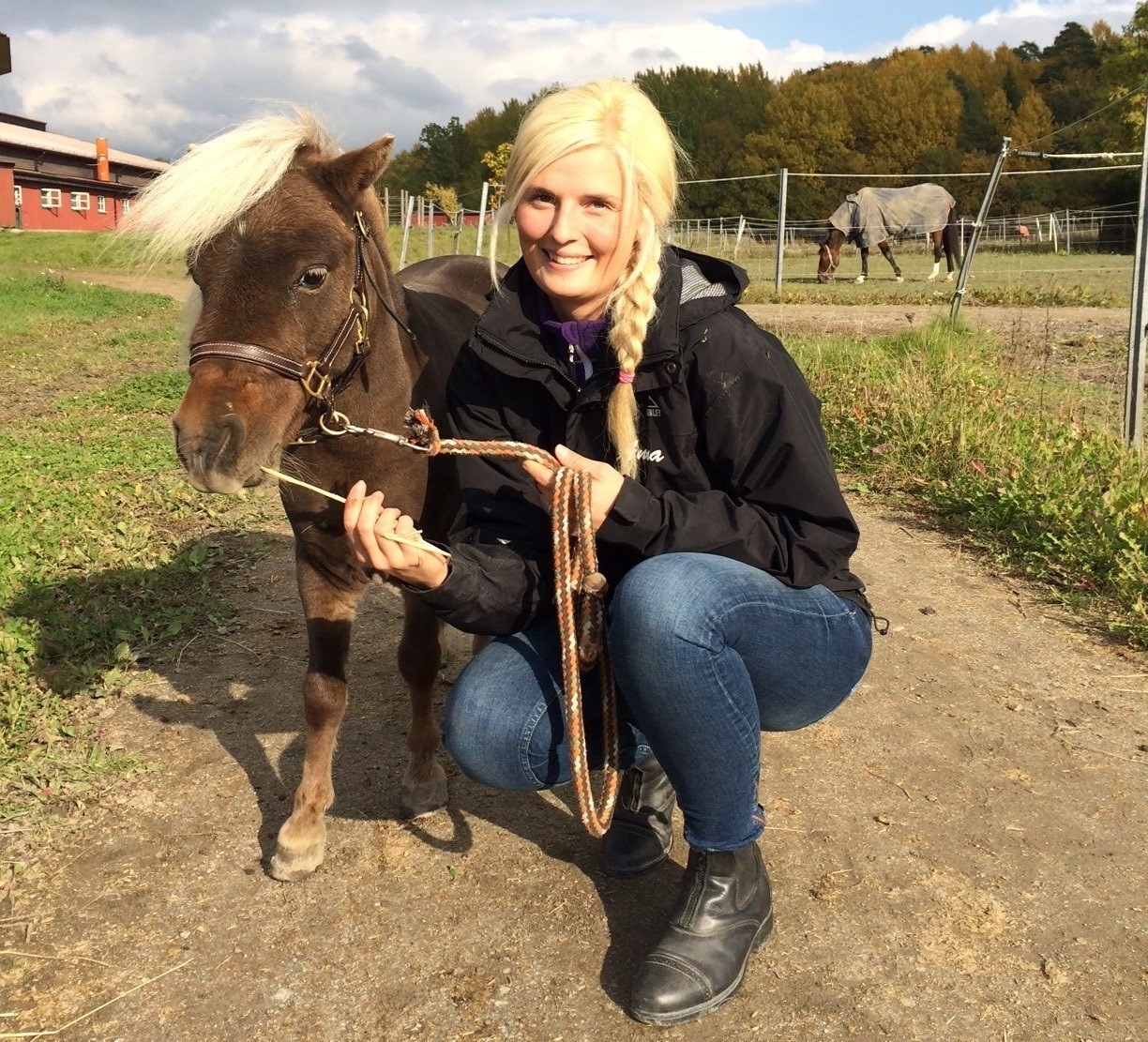 Anna Engström och Vinnie Foto: ATG